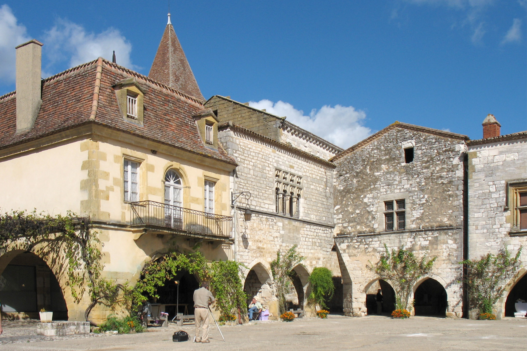 Les arcades de la place de Monpazier en Dordogne (France)